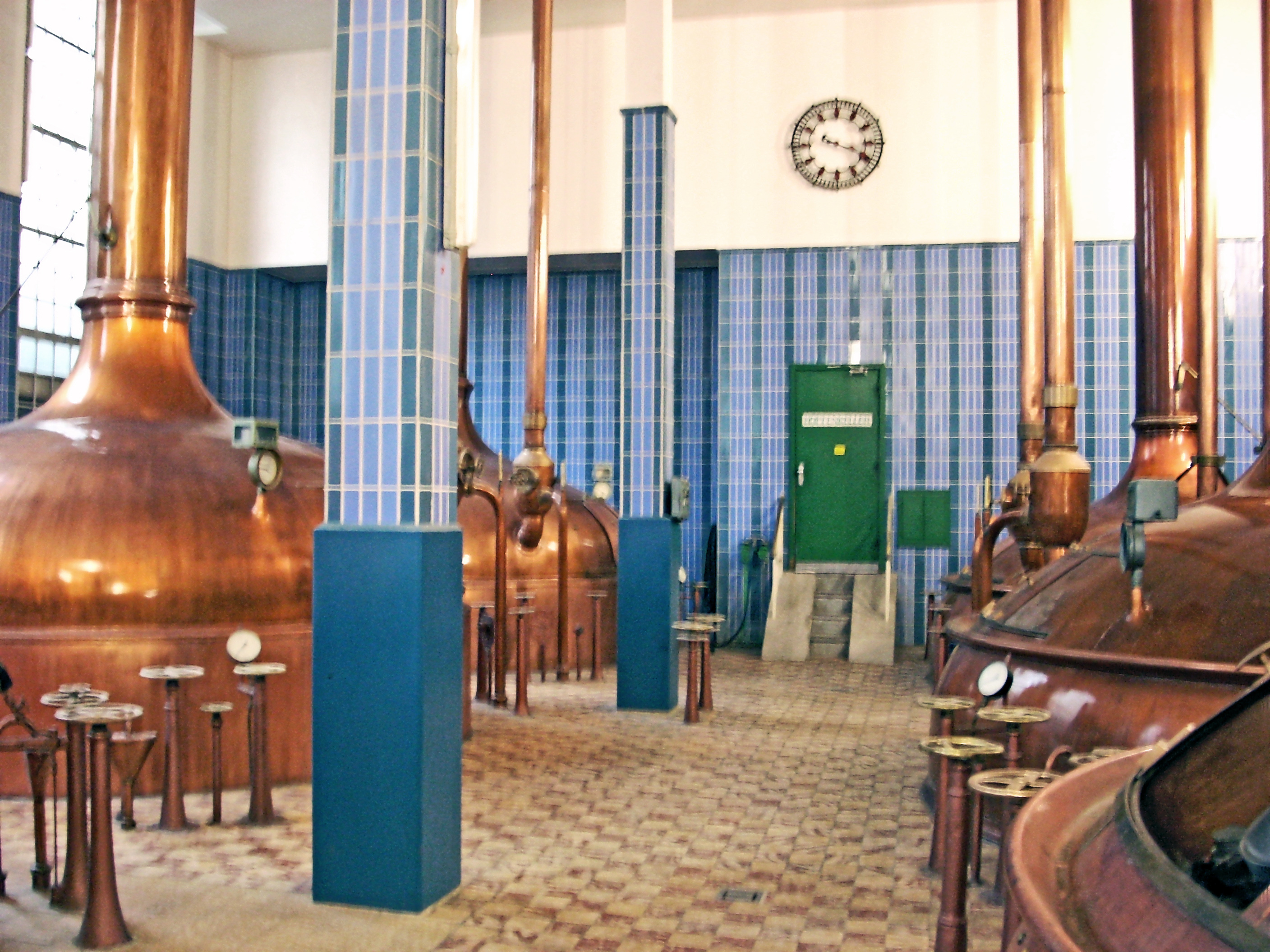 Traditionelle Kupfer-Sudkessel im Sudhaus 2 der Brauerei Beck & Co. in Bremen, Deutschland.